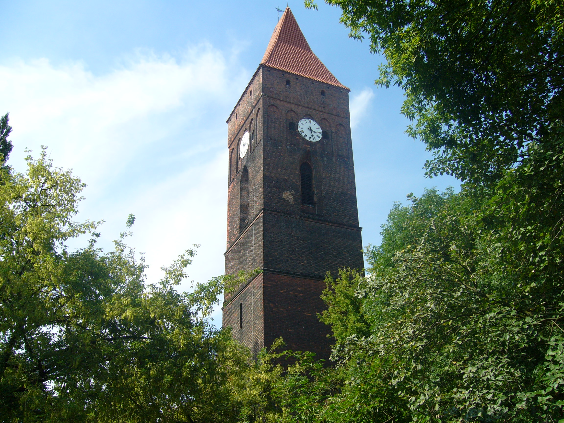 prawdopodobnie ogromniasta dzwonnica